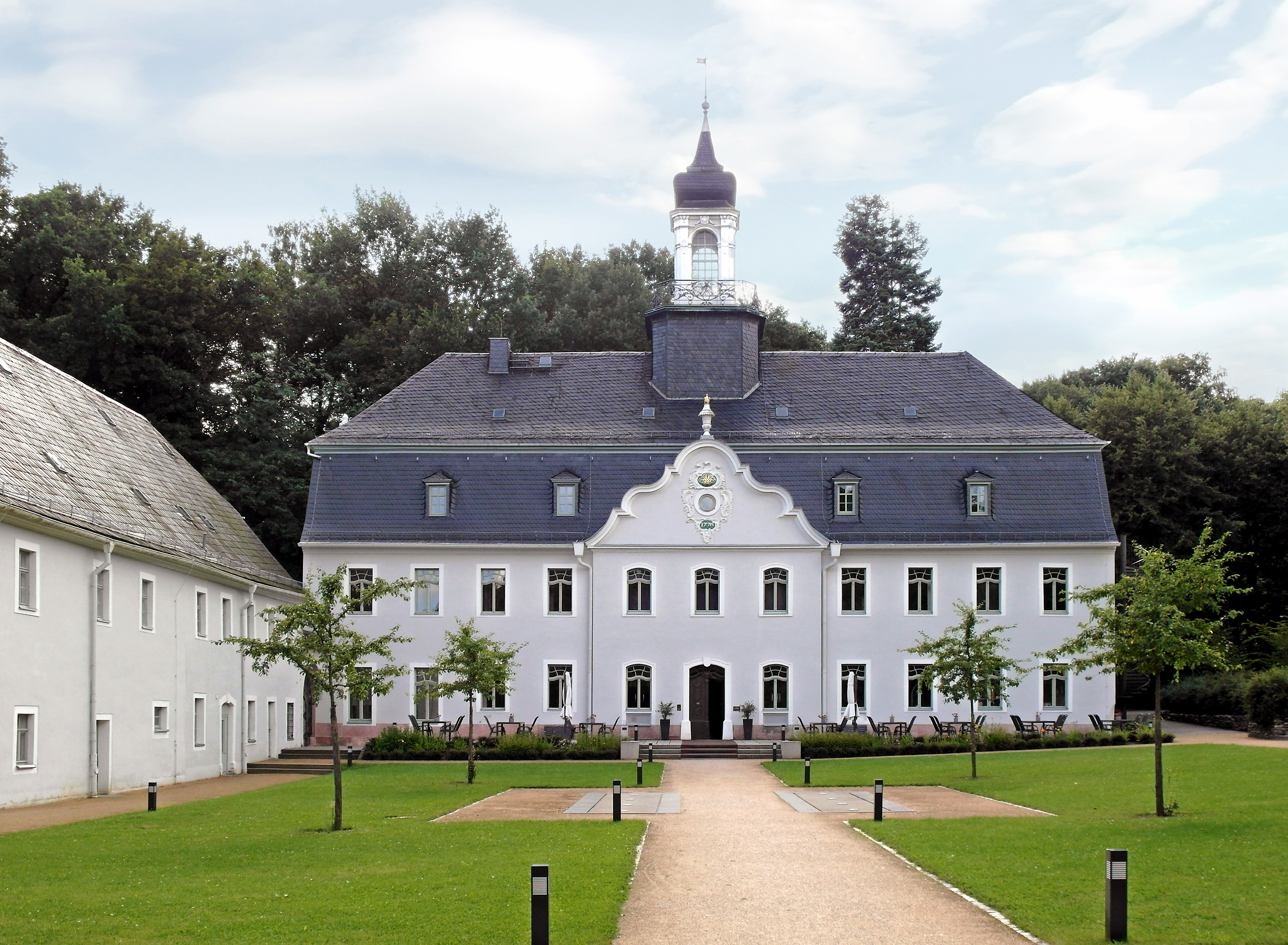 01.08.2016 09117 Rabenstein / Oberrabenstein (zu Chemnitz), Thomas-Müntzer-Höhe 14: Hotel Schloß Oberrabenstein (GMP: 50.833481,12.816376) Gartenseite. Das barocke Schloß Rabenstein wurde 1776 vom damaligen Herren der Burg und des Rittergutes zu Oberrabenstein Johann Georg Siegert erbaut. Es diente bis 1945 als herrschaftlicher Wohnsitz. Die Besetzung des Hauses durch die russische Kommandantur erfolgte im Jahre 1946. Später in der DDR Altersheim und Gästehaus des VEB Textima. Heute Hotel. [SAM7382.JPG]20160801800DR.JPG(c)Blobelt